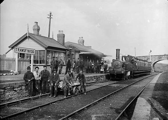 Trawsfynydd railway station, Wales